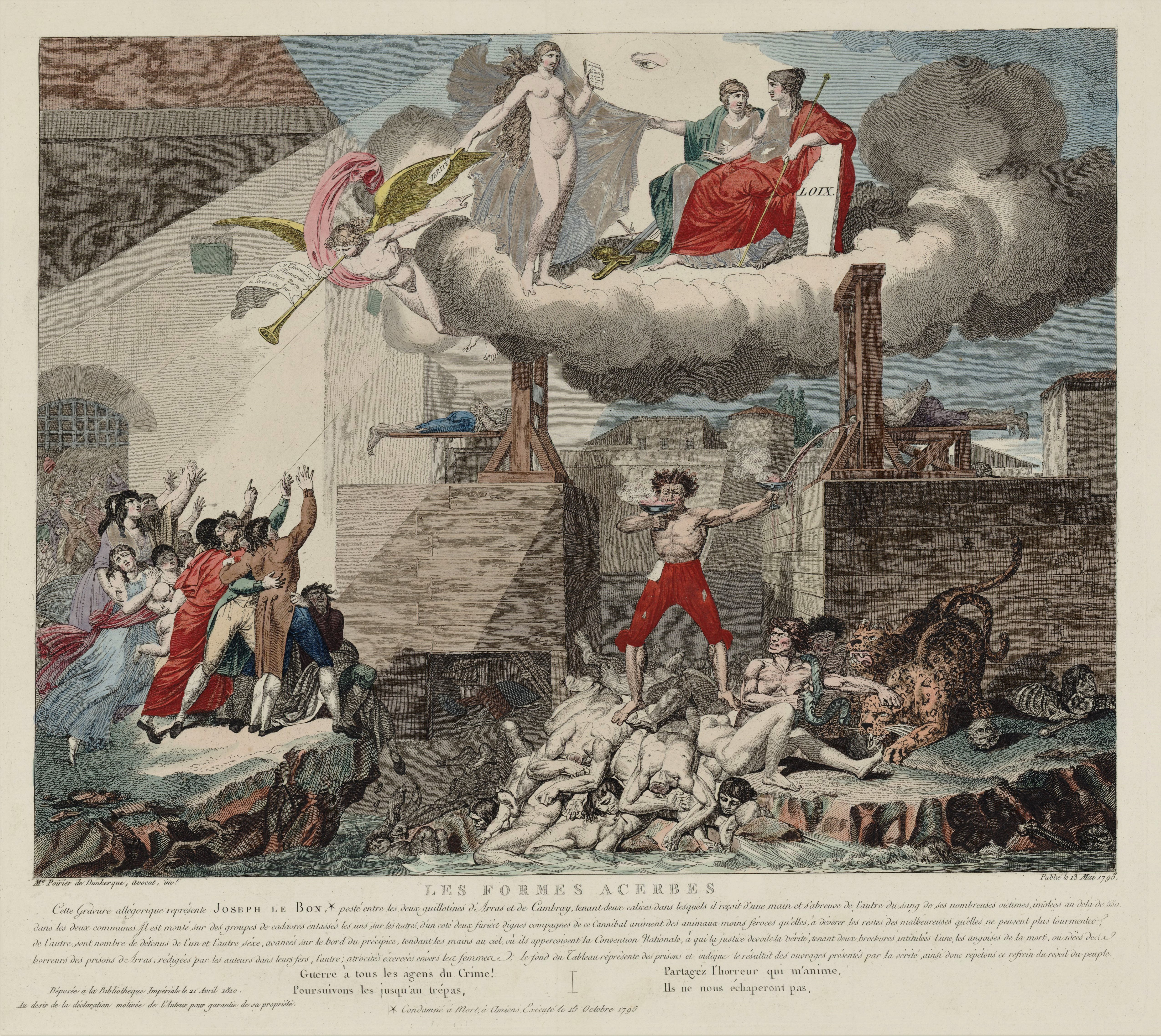 "Les formes acerbes". Library of Congress description: "Print shows Joseph Le Bon, as a shirtless, crazed madman, standing on a pile of decapitated bodies between two guillotines, he is drinking blood from a chalice as he fills another chalice with the blood spewing from freshly decapited victim. Notice of his own execution appears at the bottom center of the print: Condamné à mort, à Amiens. Executé le 15 Octobre 1795." Caption (in French [modernized spelling]): "Cette gravure allégorique représente Joseph Le Bon*, posté entre les deux guillotines d'Arras et de Cambrai, tenant deux calices dans lesquels il reçoit d'une main et s'abreuve de l'autre du sang de ses nombreuses victimes, immolées au-delà de 550 dans les deux communes. Il est monté sur des groupes de cadavres entassés les uns sur les autres. D'un côté, deux furies, dignes compagnes de ce cannibal, animent des animaux moins féroces qu'elles, à dévorer les restes des malheureuses qu'elles ne peuvent plus tourmenter ; de l'autre, sont nombre de détenus de l'un et l'autre sexe, avancés sur le bord du précipice, tendant les mains au ciel, où ils aperçoivent la Convention Nationale, à qui la justice devoile la vérité, tenant deux brochures intitulées, l'une, les angoisses de la mort, ou idées des horreurs des prisons d'Arras, redigées par les auteurs dans leurs fers ; l'autre, atrocités exercées envers les femmes. Le fond du tableau réprésente des prisons et indique le résultat des ouvrages présentés par la vérité. Ainsi donc répétons ce refrain du réveil du peuple : Guerre à tous les agents du crime ! / Poursuivons-les jusqu'au trépas, / Partagez l'horreur qui m'anime, / Ils ne nous échapperont pas. *Condamné à mort à Amiens. Exécuté le 15 octobre 1795."